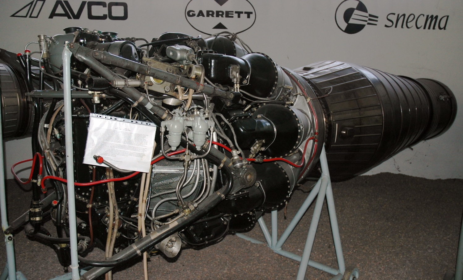 Lis-5 (Klimov VK-1F) turbojet engine (Polish Aviation Museum)